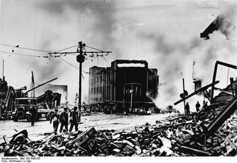 Coventry nach Luftangriff ADN-Bildarchiv II. Weltkrieg 1939-1945 Großbritannien: Am 14./15.11.1940 wurde die Stadt Coventry durch deutsche Luftangriffe fast völlig zerstört. Das zerstörte Rüstungszentrum der Stadt. Aufnahme: Hoffmann; 6.1.1941 Anm.: Es handelt sich nicht um das „Rüstungs"zentrum, sondern um das Kaufhaus Owen Owen im Stadtzentrum. Vergl. File:Coventry_bomb_damage_H5600.jpg